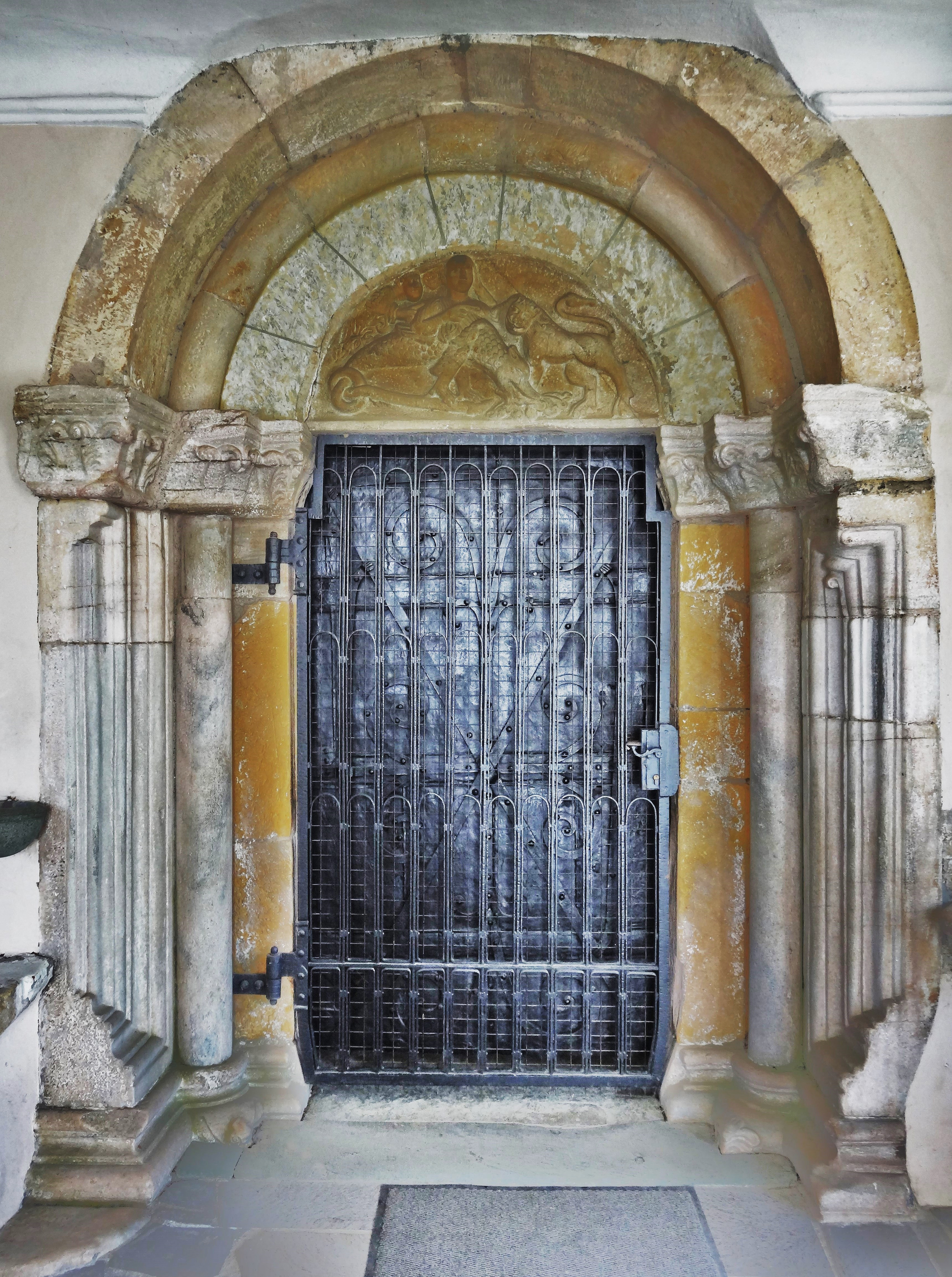 Kath. Pfarrkirche Hl. Margarethe, Lieding, (Straßburg). Das Westportal